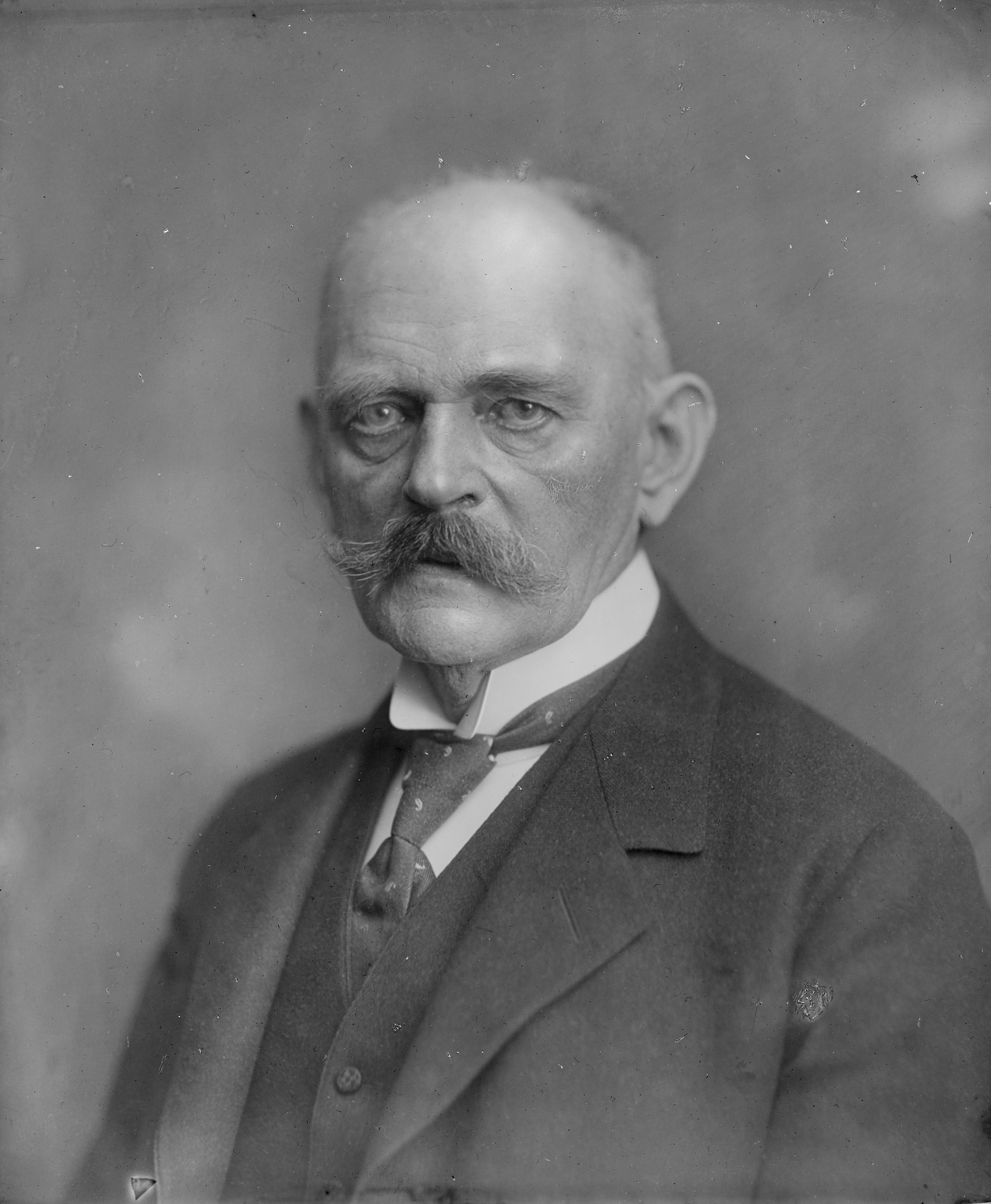 Niels Thomasius Neergaard (27. juni 1854 - 2. september 1936). Dansk politiker og historiker, konseilspræsident fra 1908 til 1909 og statsminister fra 1920 til 1924.